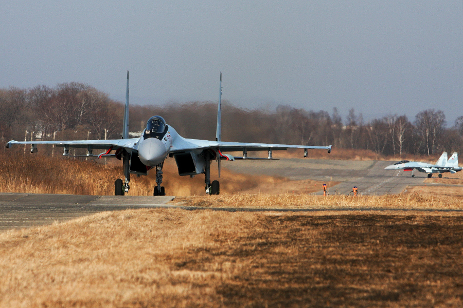 22-й гвардейский истребительный авиационный Краснознамённый полк получил первые истребители Су-35С.